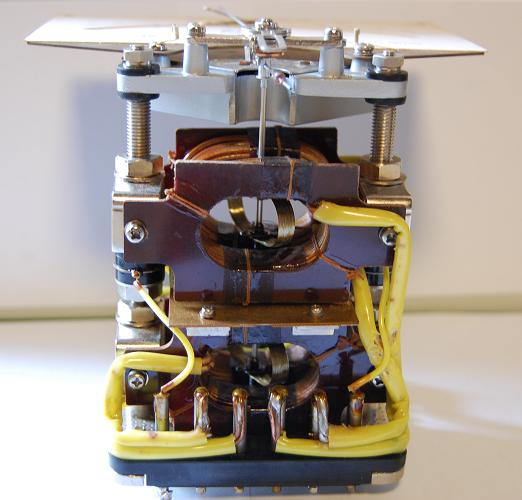 Wattmeters